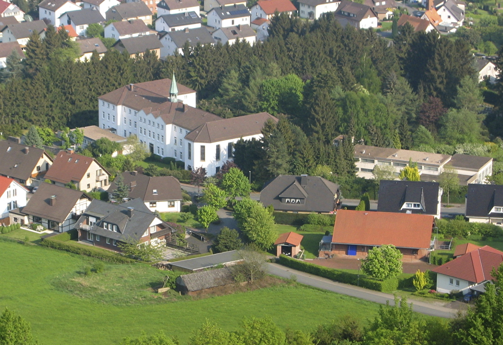 Blick vom Kaiser-Karls-Turm (von Nordwesten, Luftlinie etwa 500 m) aufs Dreifaltigkeitskloster der „Rosa Schwestern“ in der Helmtrudisstraße in Bad Driburg, Nordrhein-Westfalen, Deutschland